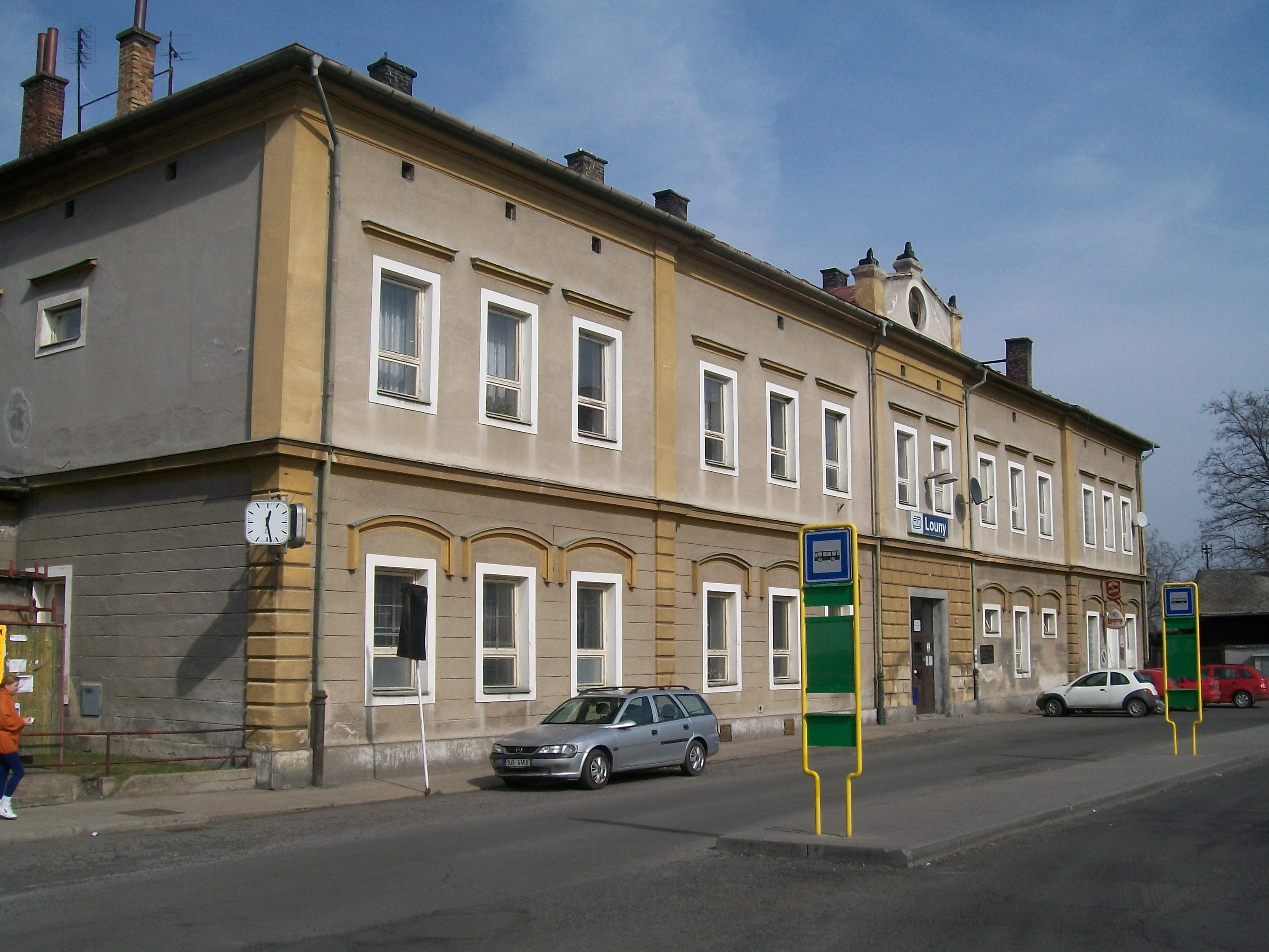 Hlavní vlaková stanice Louny